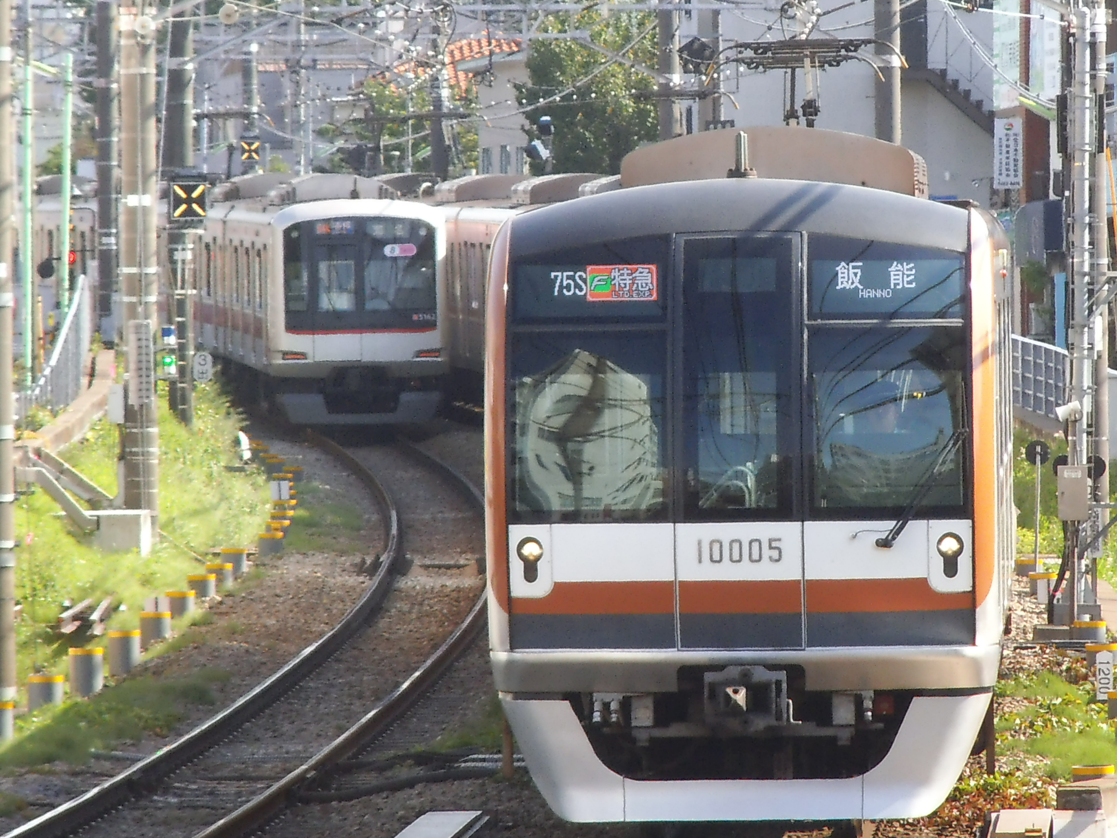 東京メトロ10000系 LED